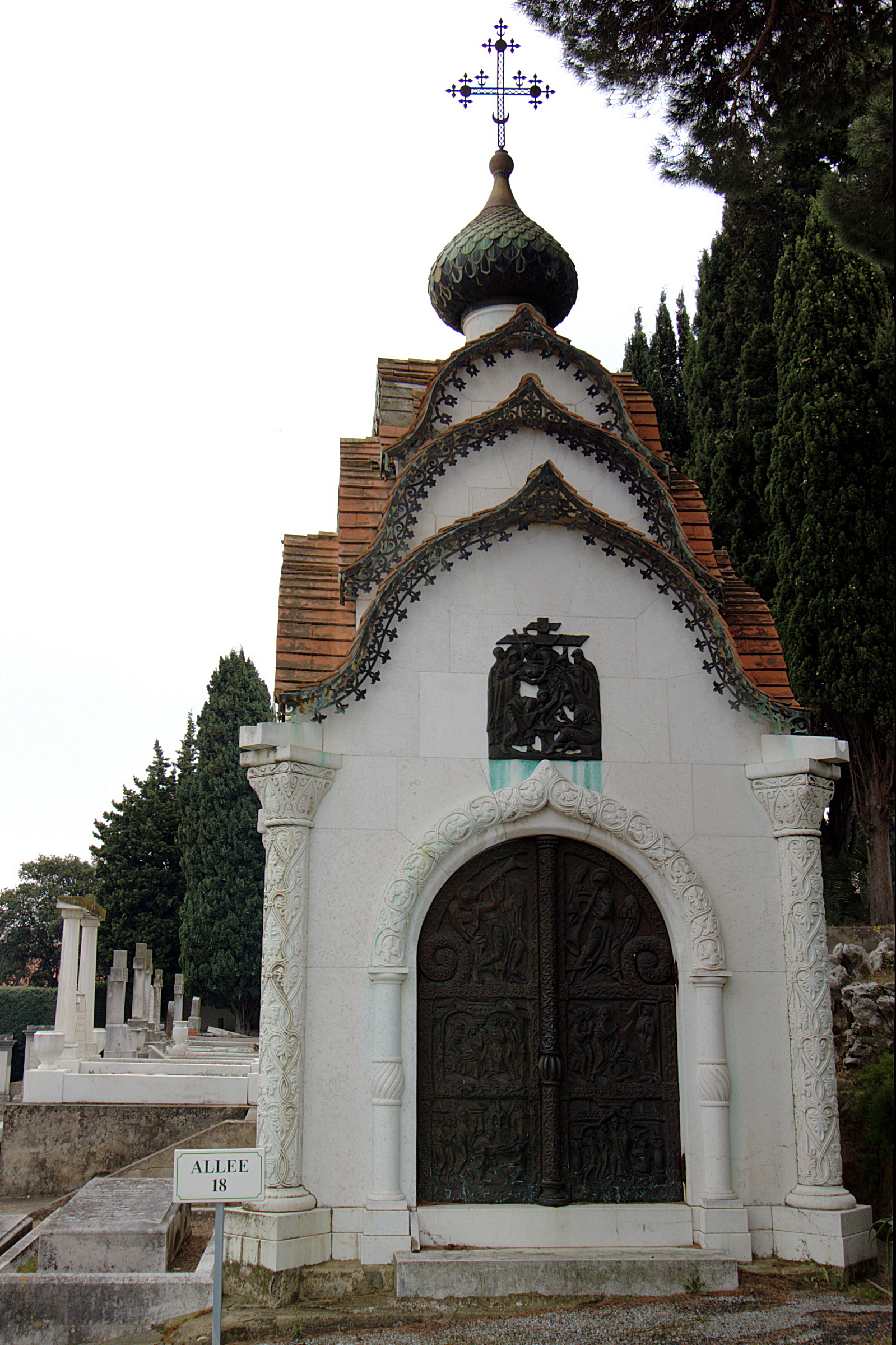 Английский участок кладбища Гран-Жас. На нём находится целый ряд русских могил, в том числе семейная часовня Сергея Павловича и Марины Сергеевны (урожд. Шёниг) фон Дервиз. Барельеф на дверях часовни выполнен Д.М. Стеллецким